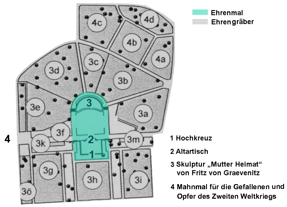 Plan des Ehrenhains für die gefallenen Teilnehmer des Ersten Weltkriegs auf dem Waldfriedhof in Stuttgart. Ausschnitt aus einer Karte des Friedhofsamtes der Stadt Stuttgart vom 26. Februar 2014.